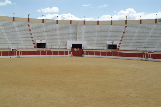 Vista de dentro